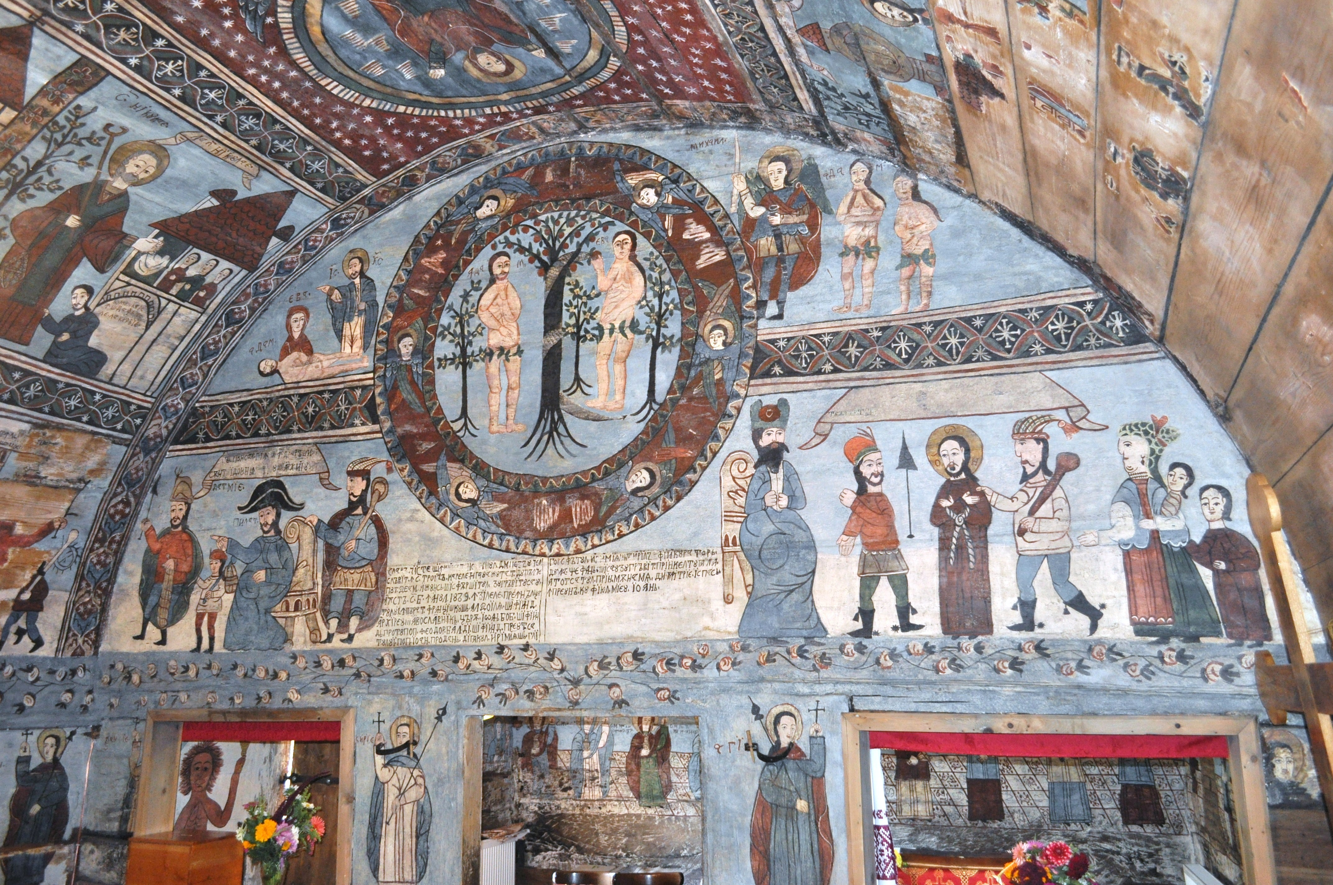 Biserica de lemn „Sf. Arhangheli Mihail şi Gavriil" din Tăuți, județul Cluj